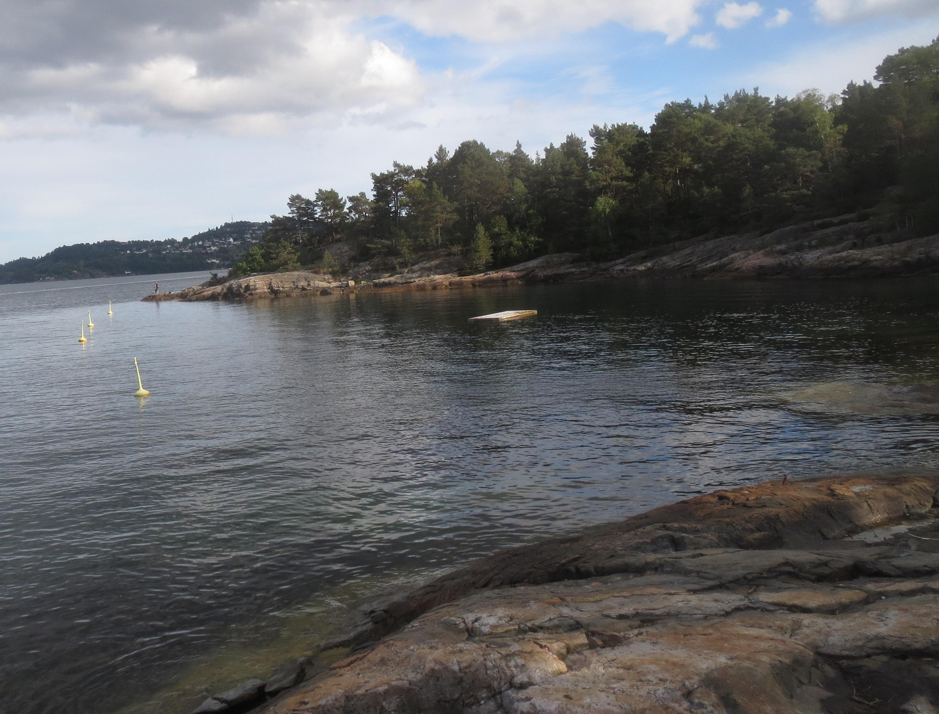 Paradisbukta, Fagerholt, Kristiansand